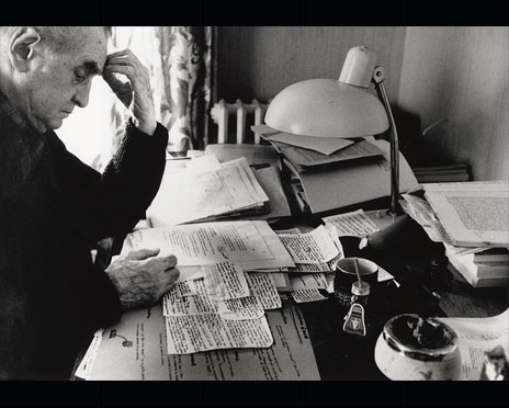 Jean Paulhan trabajando en sus notas en 1967